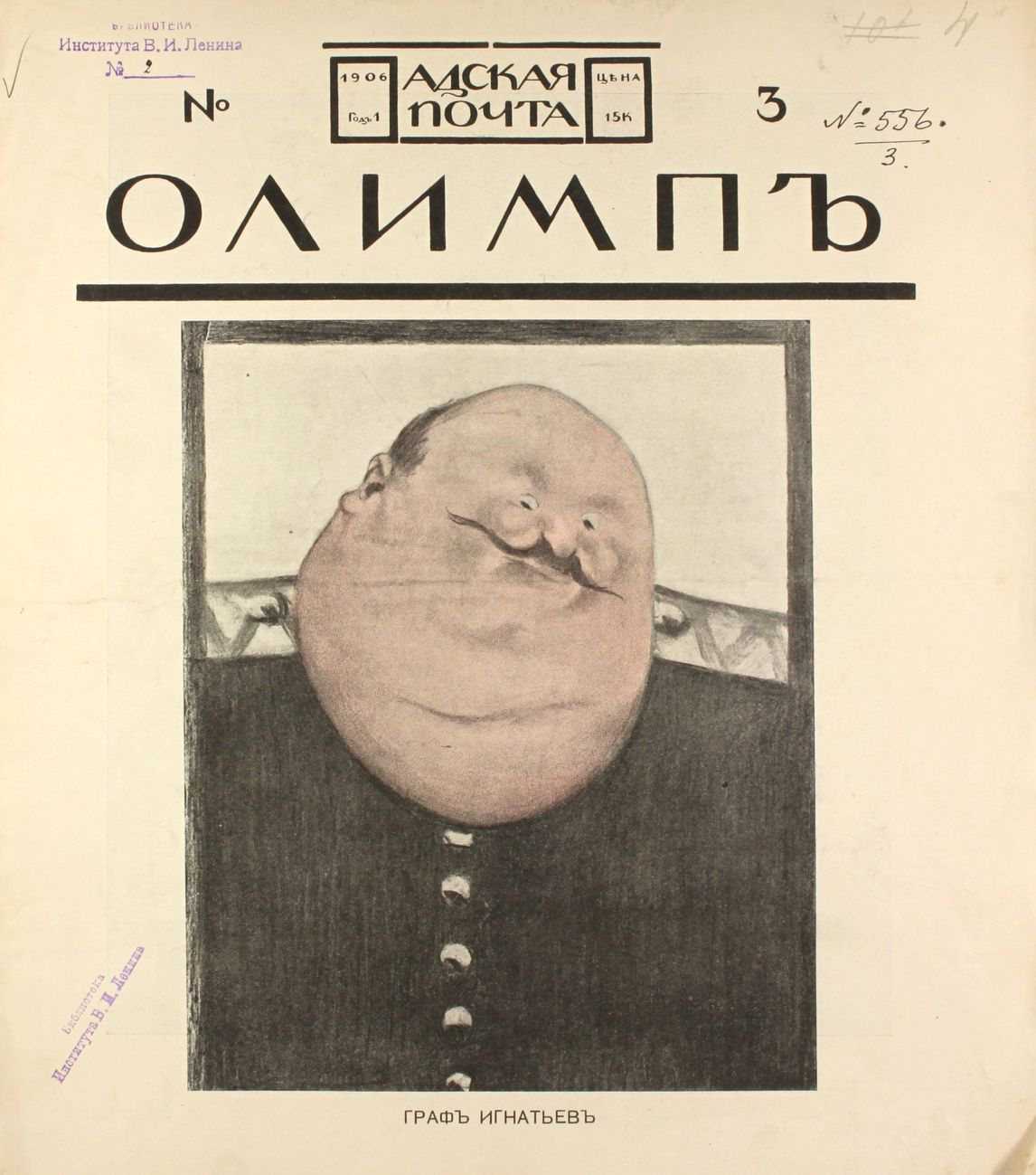 Дореволюционный журнал